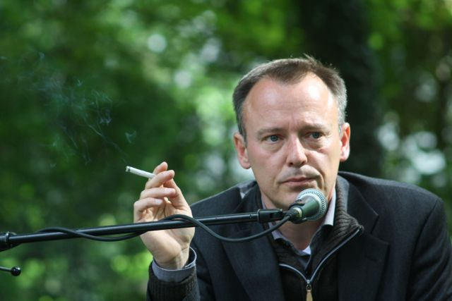 Der Schriftsteller Mirko Bonné auf dem Erlanger Poetenfest 2013 bei der Vorstellung seines Romanes "Nie mehr Nacht".